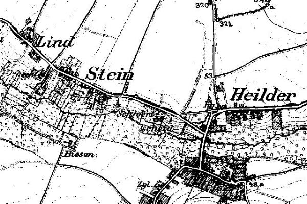 Neuaufnahme 1891 -1912